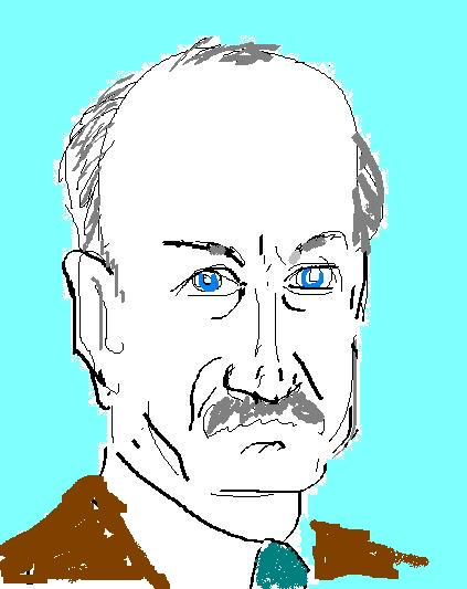 Portret van Talcott Parsons (1902-1979)